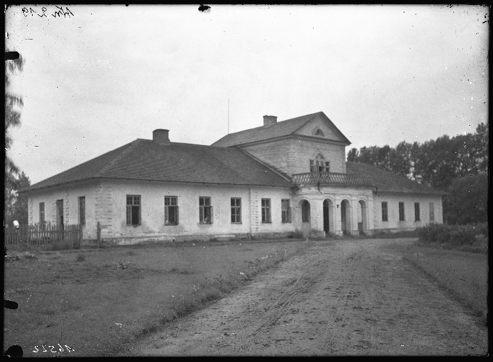 Беларуская (тарашкевіца): Ідолта (Idołta), сядзіба Мілашаў (Miłaš)